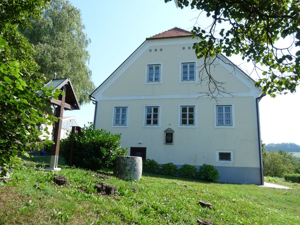 Rojstna hiša Antona Martina Slomška, Slom ob Ponikvi